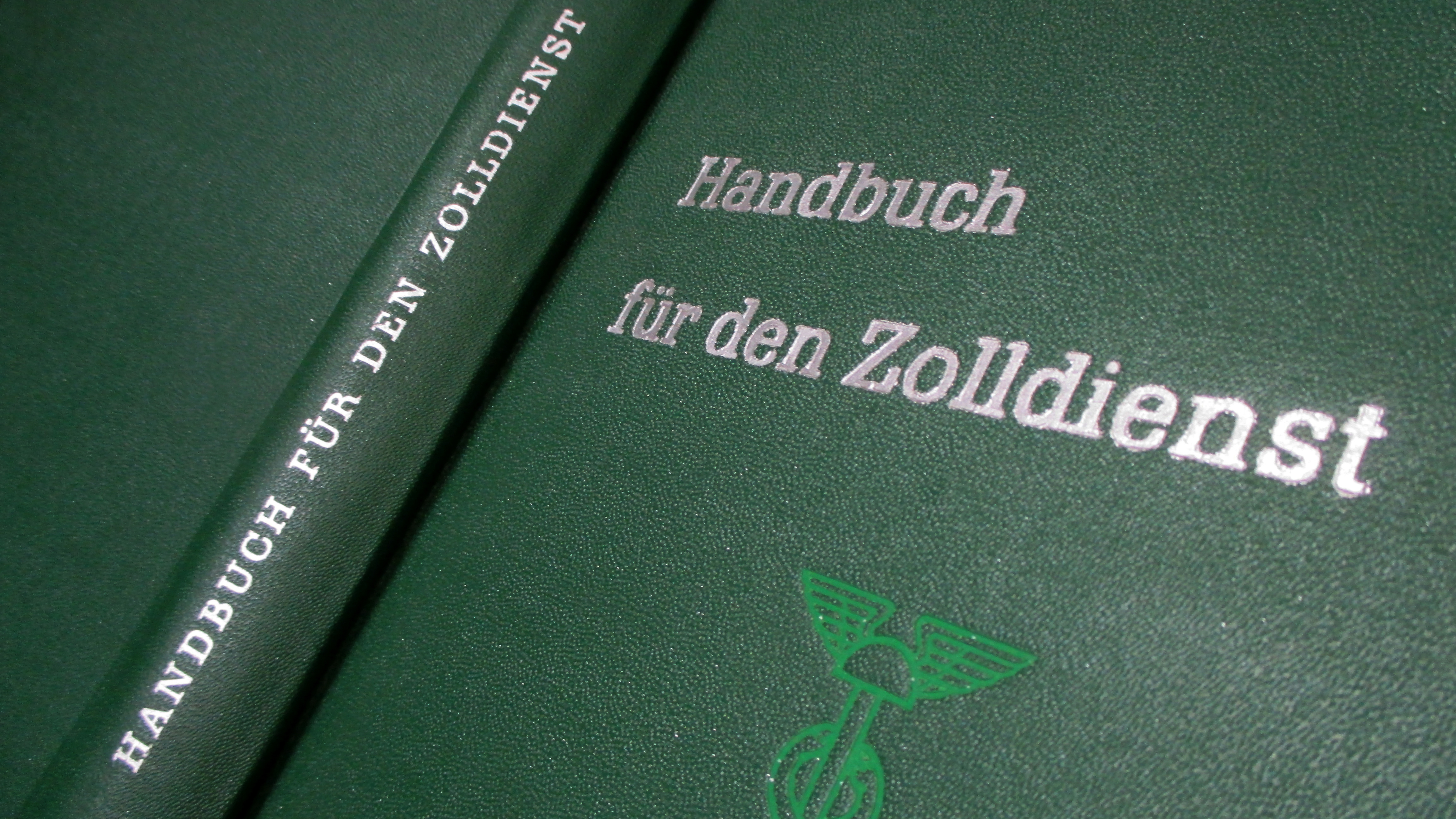 DDR Zolldienst - Einband - Handbuch für den Zolldienst